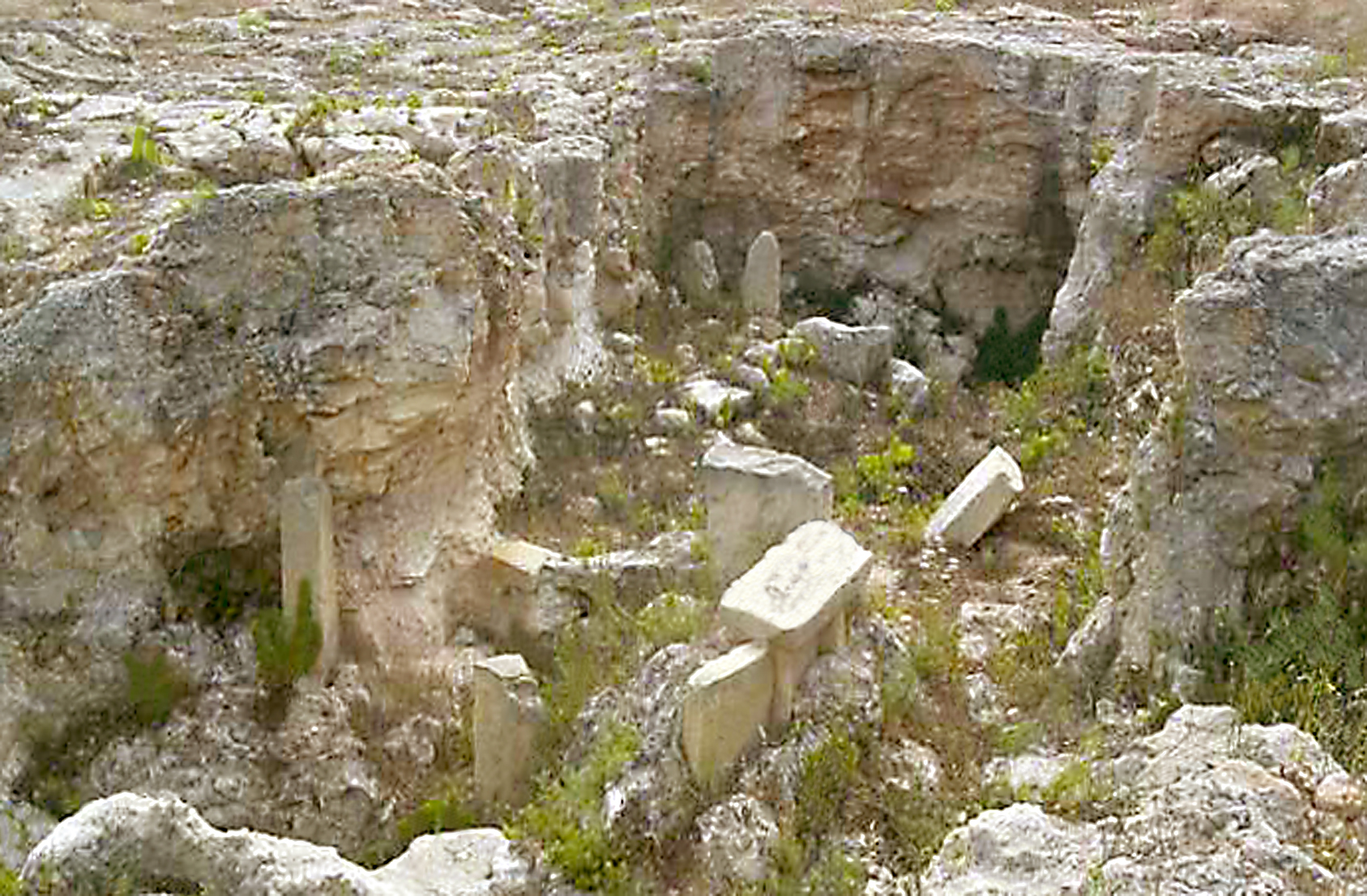 état des fouilles de l'hypogée de Xaghra This media is about Maltese cultural property with inventory number 26.